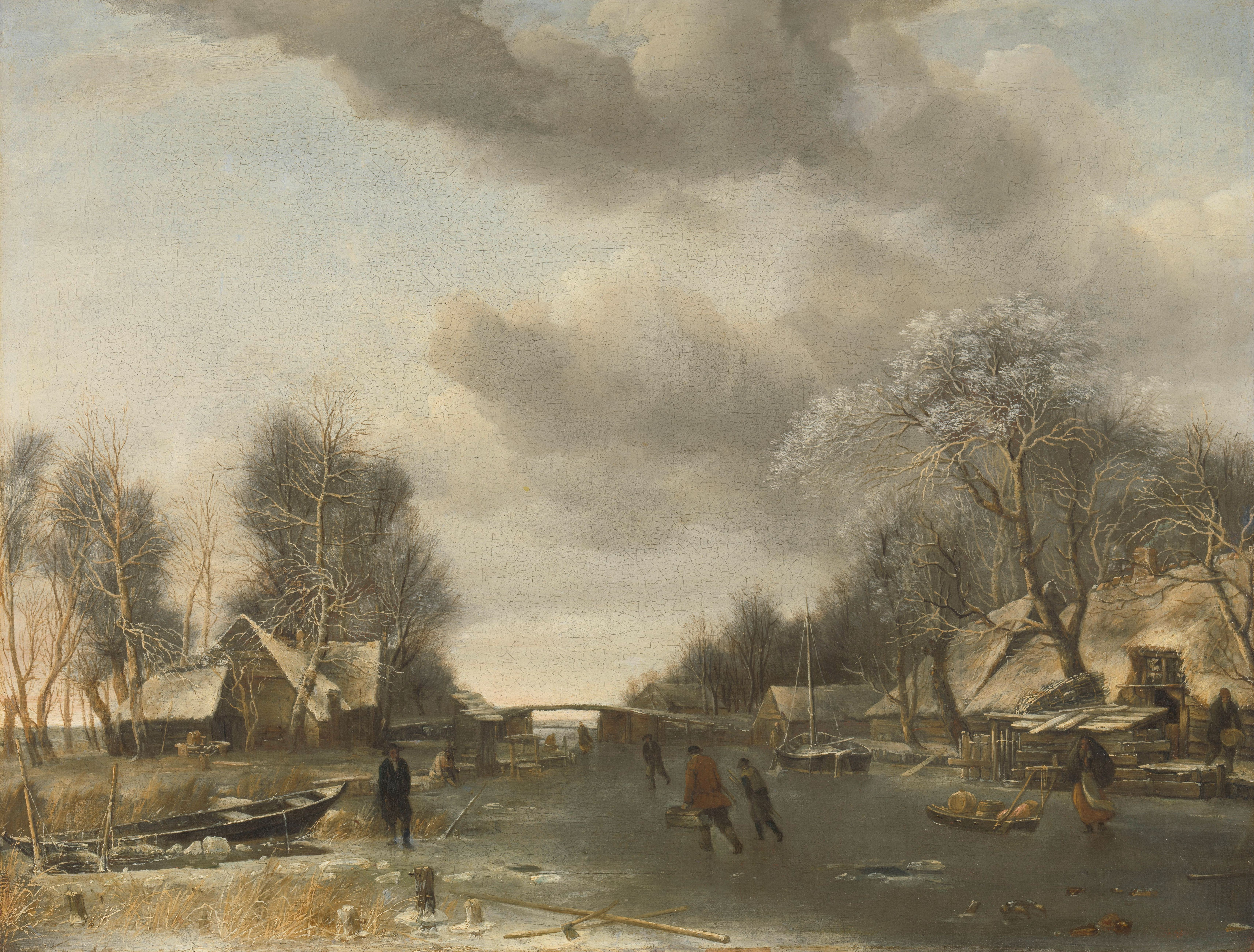 Wintergezicht. Bevroren vaart met figuurtjes op het ijs, aan weerszijden boerderijen, in de verte een brug. Rechts een vrouw bij een beladen slede, links een man bij een roeiboot.